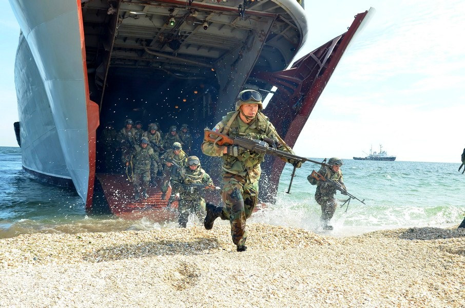 Navy. Ukrainian marines